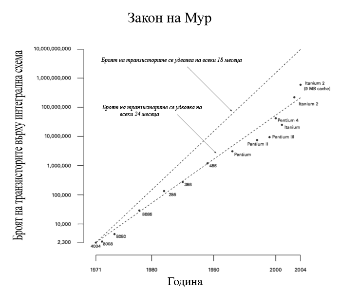 Долната пунктирана линия съвпада с фактически постигнатата изчислителна мощност и отговаря на удвояване на мощността на изчисление на всеки 24 месеца. Горната линия е хипотетична и отговаря на удвояване на всеки 18 месеца